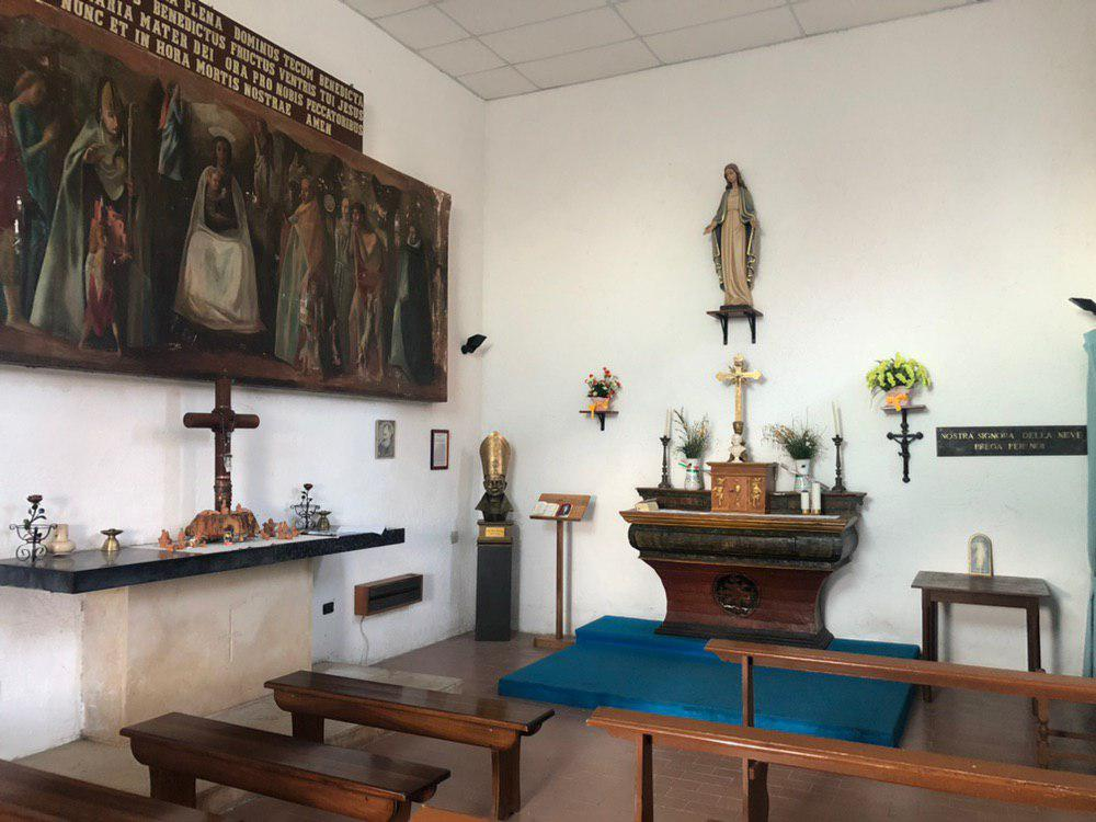 Foto dell'interno della chiesa della Madonna della Neve sita a Campo Imperatore (L'Aquila)